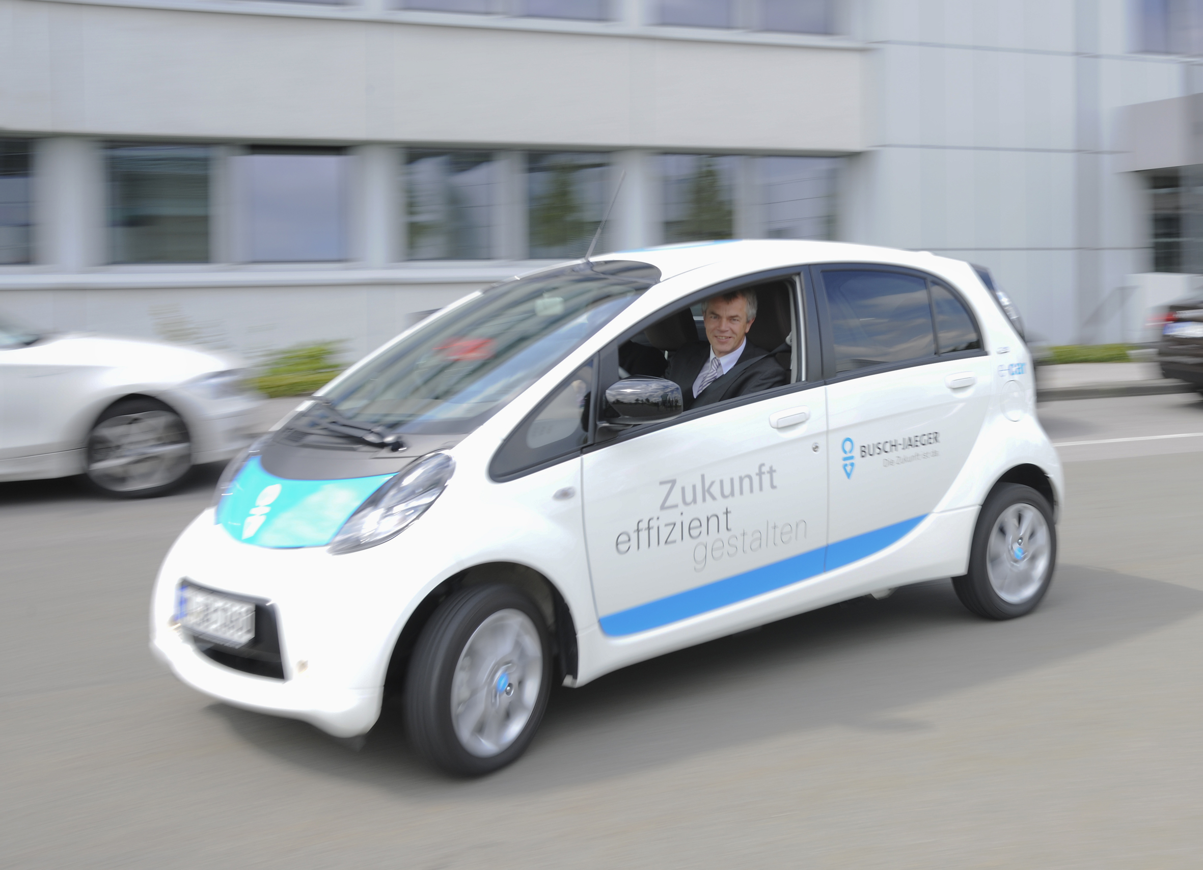 Energieeffizienz bei Busch-Jaeger Klimaschutzminister Johannes Remmel hat auf der vierte Etappe seiner Klimaschutztour am 10. August 2011 drei Unternehmen besucht, die besonders energieeffizient arbeiten. „Klimaschutz und wirtschaftliches Denken gehört zusammen. Wer Energie spart, entlastet seine Ausgabeseite. Klimaschutz ist somit keine Umwelt- und Naturromantik, sondern pure ökonomische Vernunft“, sagte Minister Remmel. Die Unternehmen Dralon (Dormagen), Busch-Jaeger Elektro (Lüdenscheid) und die Brauerei C. & A. Veltins (Meschede) nehmen am Projekt Mod.EEM (Modulares Energieeffizienzmodell) der EnergieAgentur.NRW teil. Bei diesem Pilotprojekt wird ein online-gestütztes Energiemanagementssystem entwickelt. Rund 100 Unternehmen aus NRW nehmen daran bereits teil. Weitere Informationen unter: Flickr tags: Lüdenscheid; Busch-Jaeger; Klimaschutztour; 2011; NRW; EANRW; Minister; Johannes Remmel; Klimaschutz; EnergieAgenturNRW; Energiewende; ABB; Energiemanagement